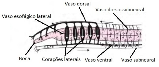 Lateral do interior de Lumbricus sp. destacando o sistema circulatório